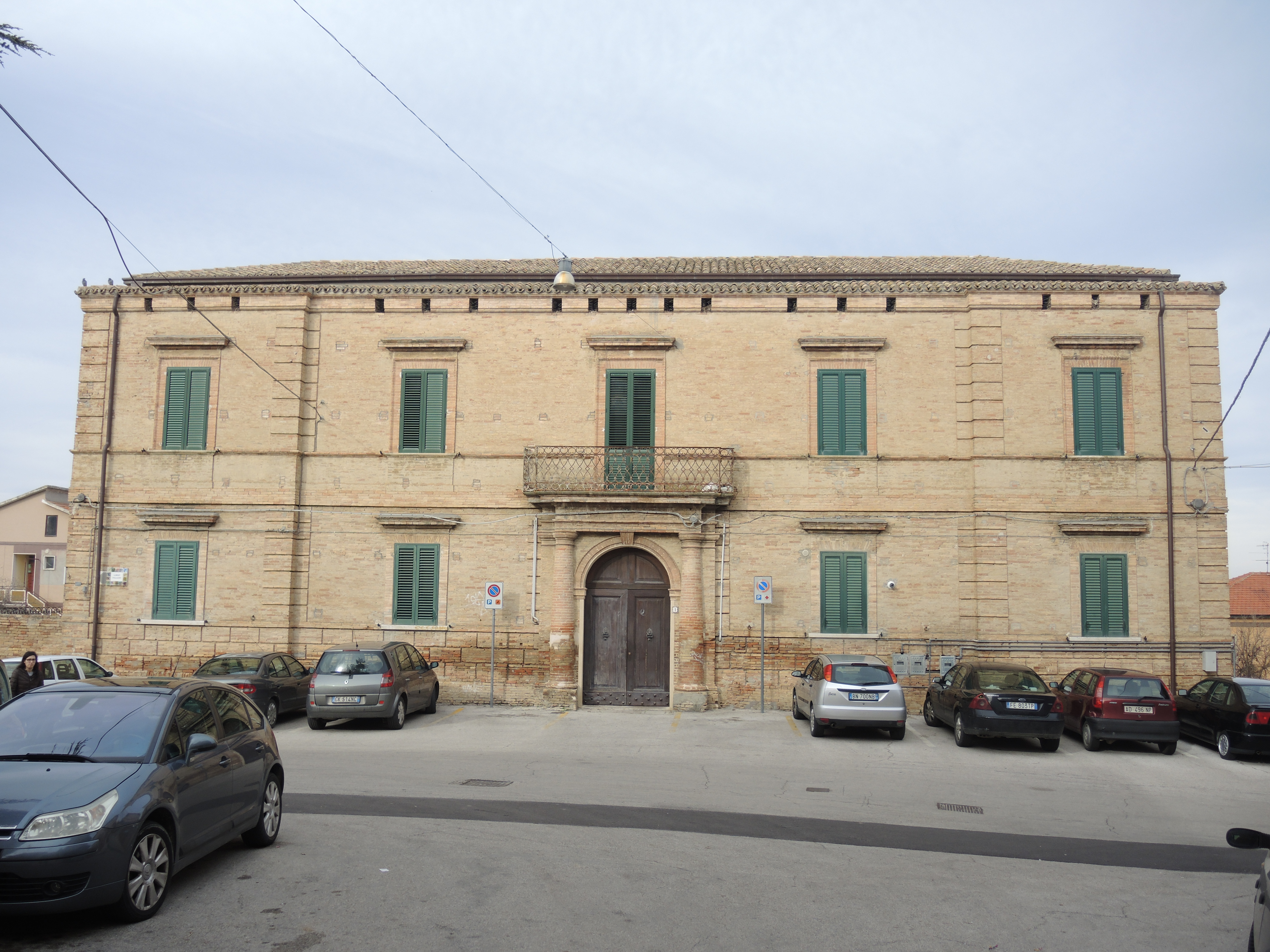 Monteodorisio